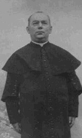 Josef Polášek (1866 - 1948), Český římskokatolický kněz.